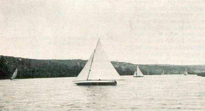 'Crabe II', le yacht du comte Chabannes La Palice, médaille d'argent ½ – 1 tonneau lors des JO 1900.